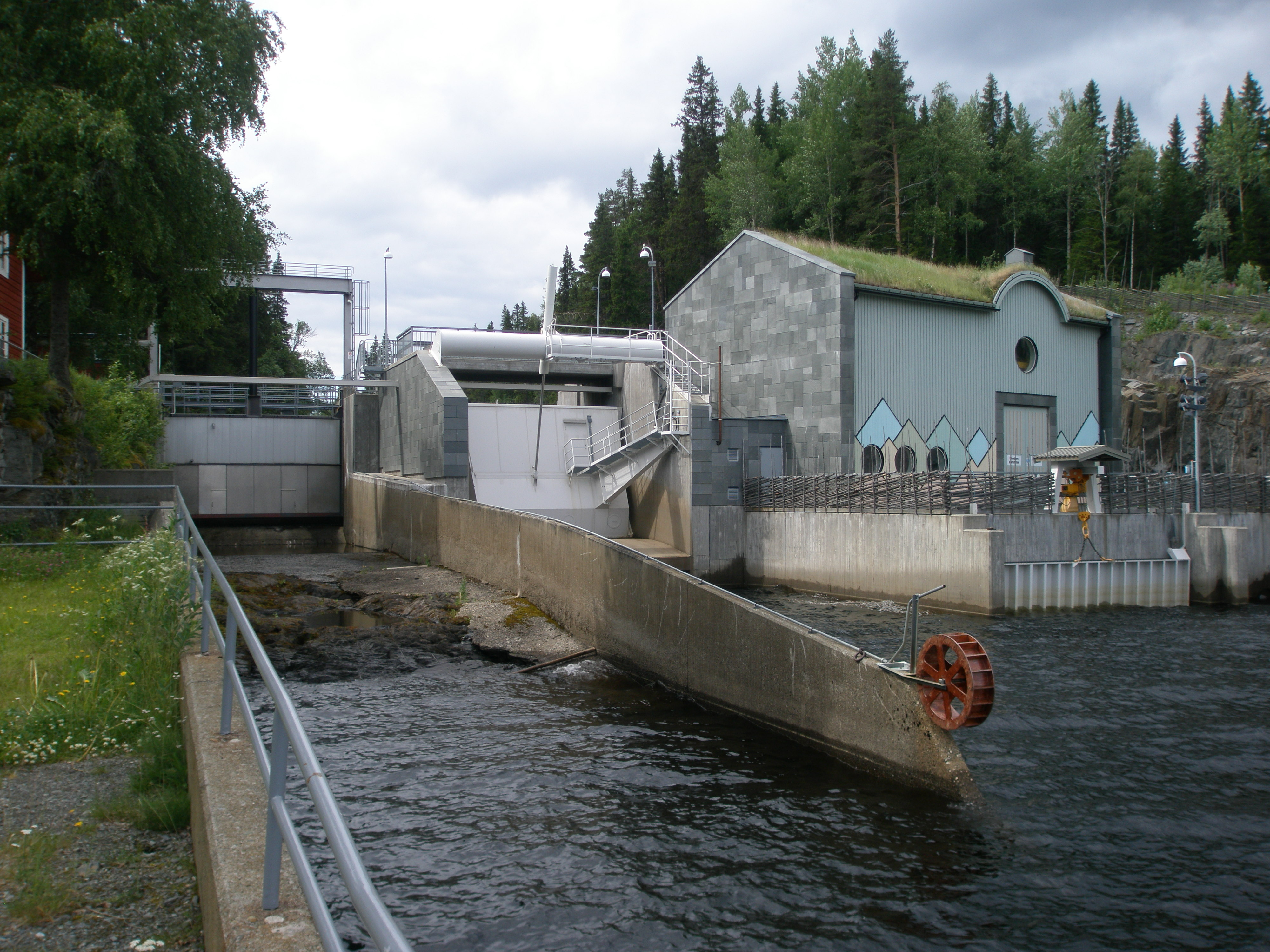 Kraftverk vid Rönnöforsen, Rönnöfors by, Offerdals socken, Krokoms kommun, Jämtland, Sverige.